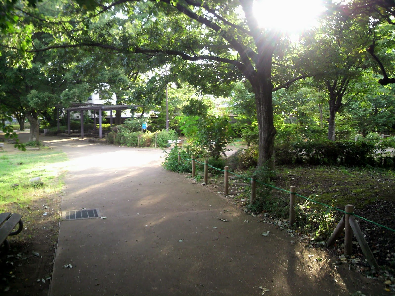 武蔵野競技場線と中島飛行機専用線の合流点。 撮影地点（地図マーカー地点）から緩やかに左カーブ（南西方向）をしているのが武蔵野競技場線です。画面手前側が武蔵野競技場、画面奥側が三鷹駅方面になります。 画面右端（北）から画面中央に向かって合流しているのが、中島飛行機専用線です。画面右端方向は中島飛行機武蔵製作所になります。一旦この地点で武蔵野競技場線と合流し、その後分岐をします。中島飛行機専用線は武蔵境駅に向かいます。武蔵野競技場線は三鷹駅に向かいます。 画面左端の先には、ビオトープ風の池と流れ込む水路があり、